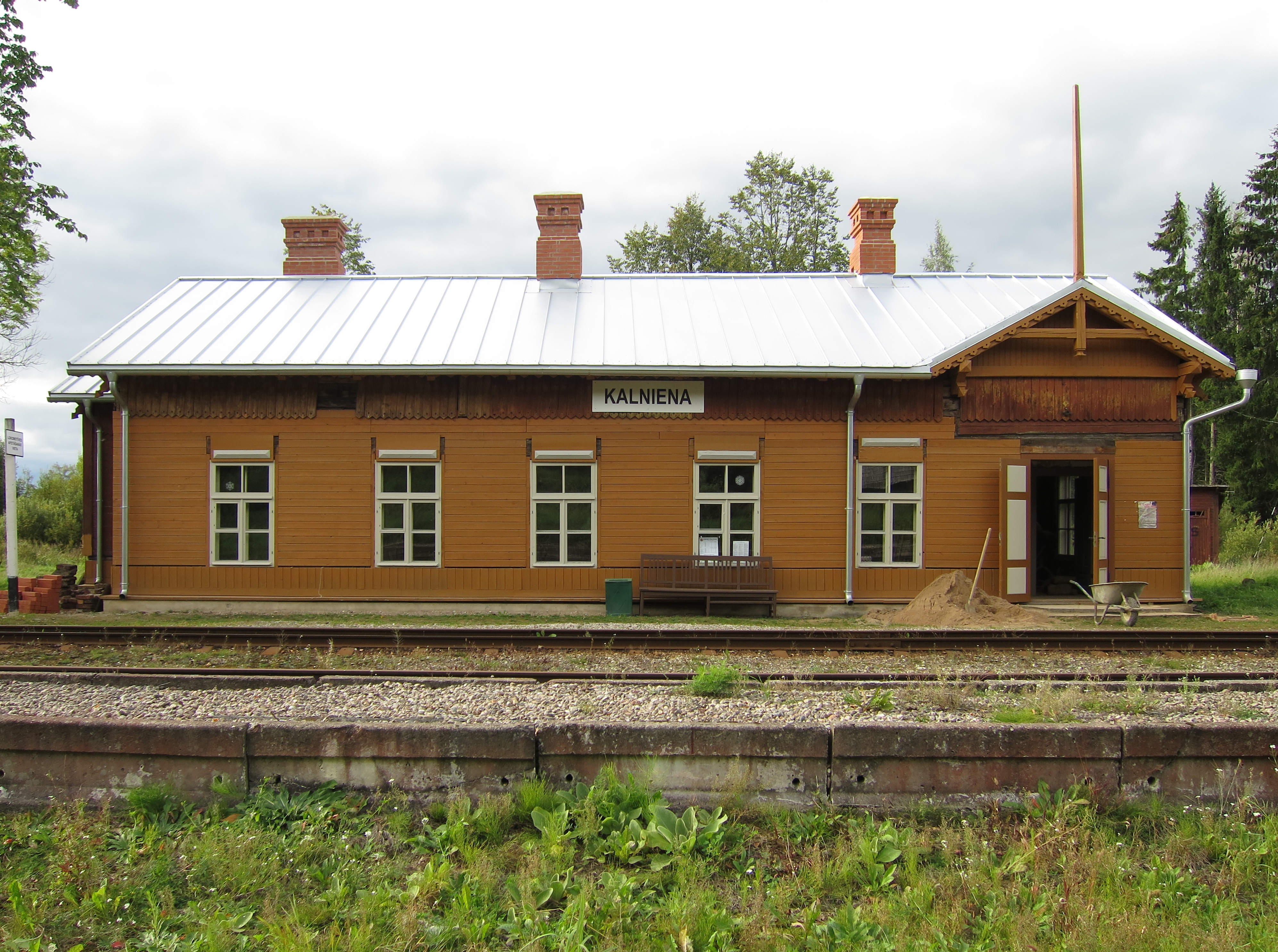 Kalnienas stacija